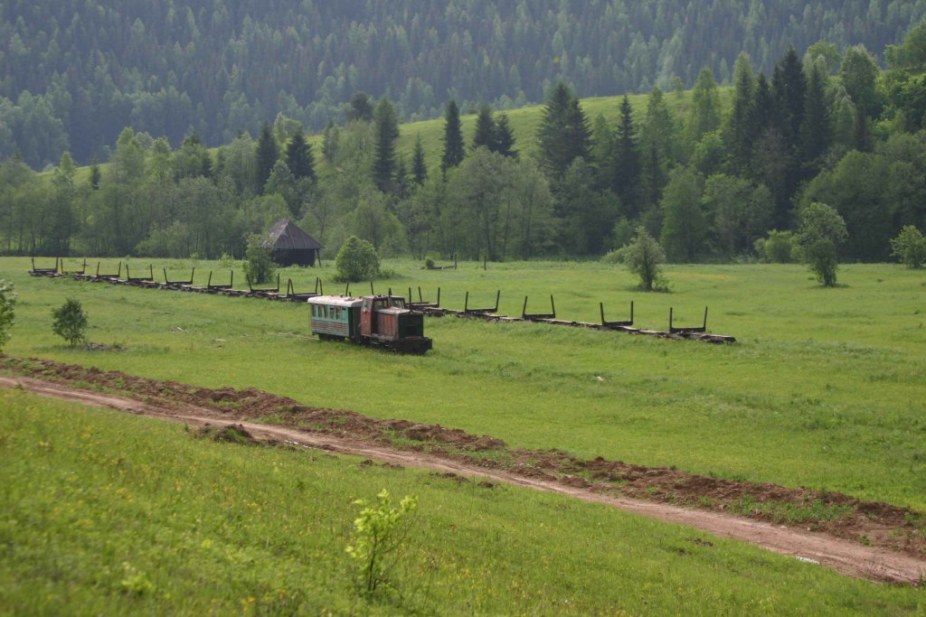 бывшее село Красивая поляна - Яман-Елгинская узкоколейная железная дорога, July, 1 2007